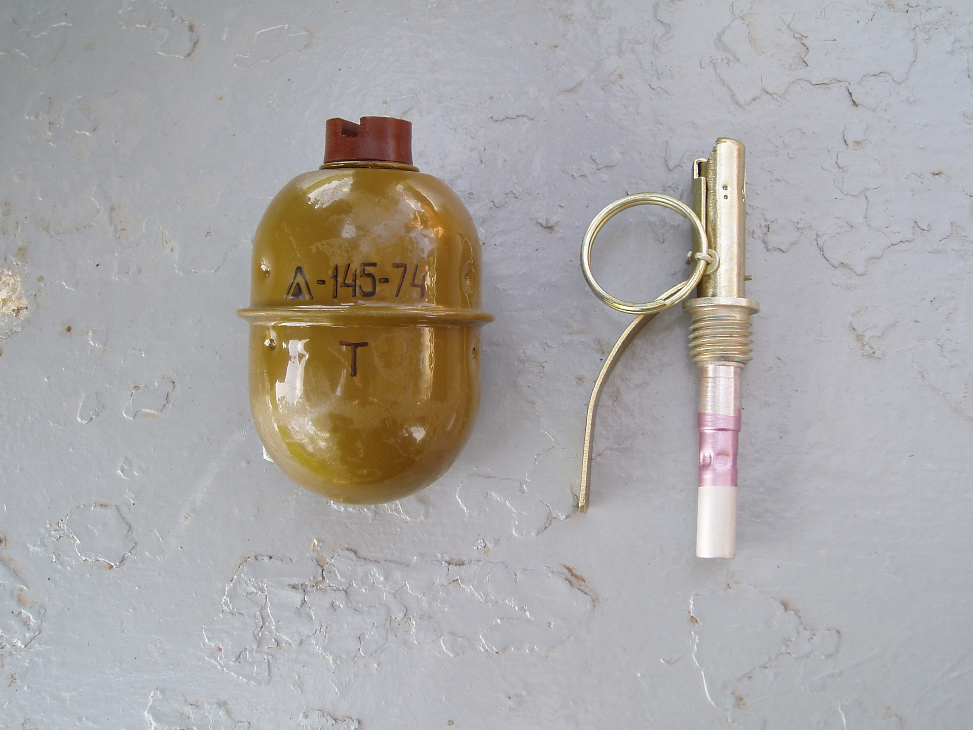 Граната РГД-5; рядом - запал для неё. Отверстие для запала в корпусе гранаты закрыто пластмассовой пробкой, чтобы грязь не попадала.